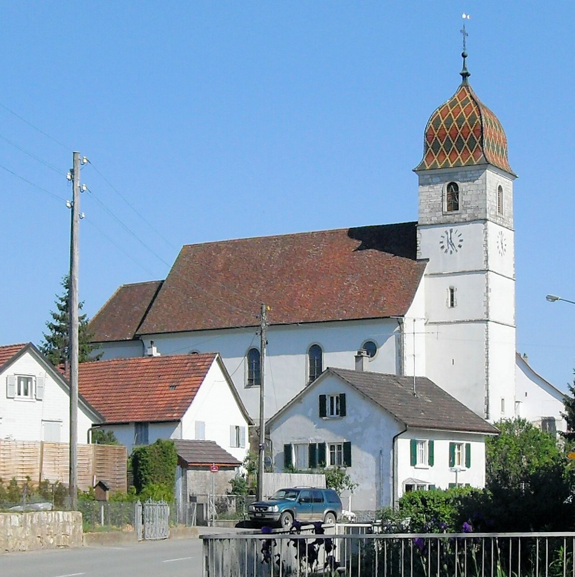 L'église Saint-Laurent à Bonfol, Suisse